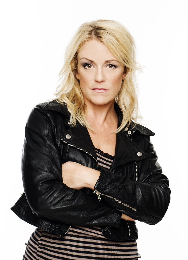 Karin Adelsköld